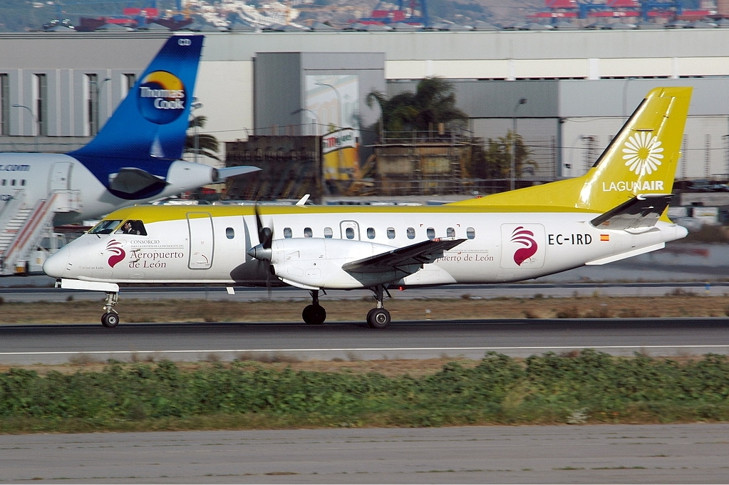 LagunAir Saab-Fairchild SF-340A